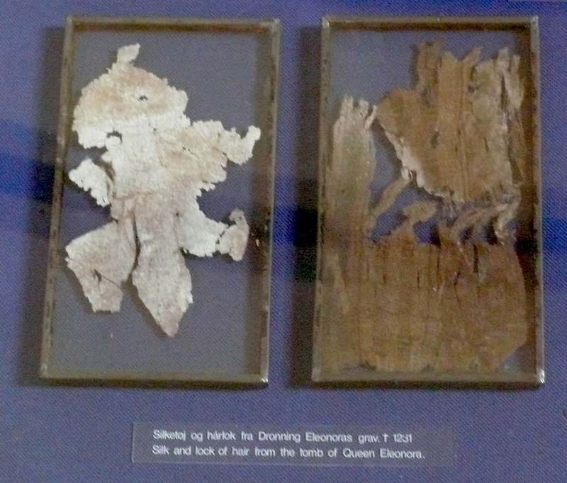 Zbytky tkanin z hrobu Eleonory Portugalské